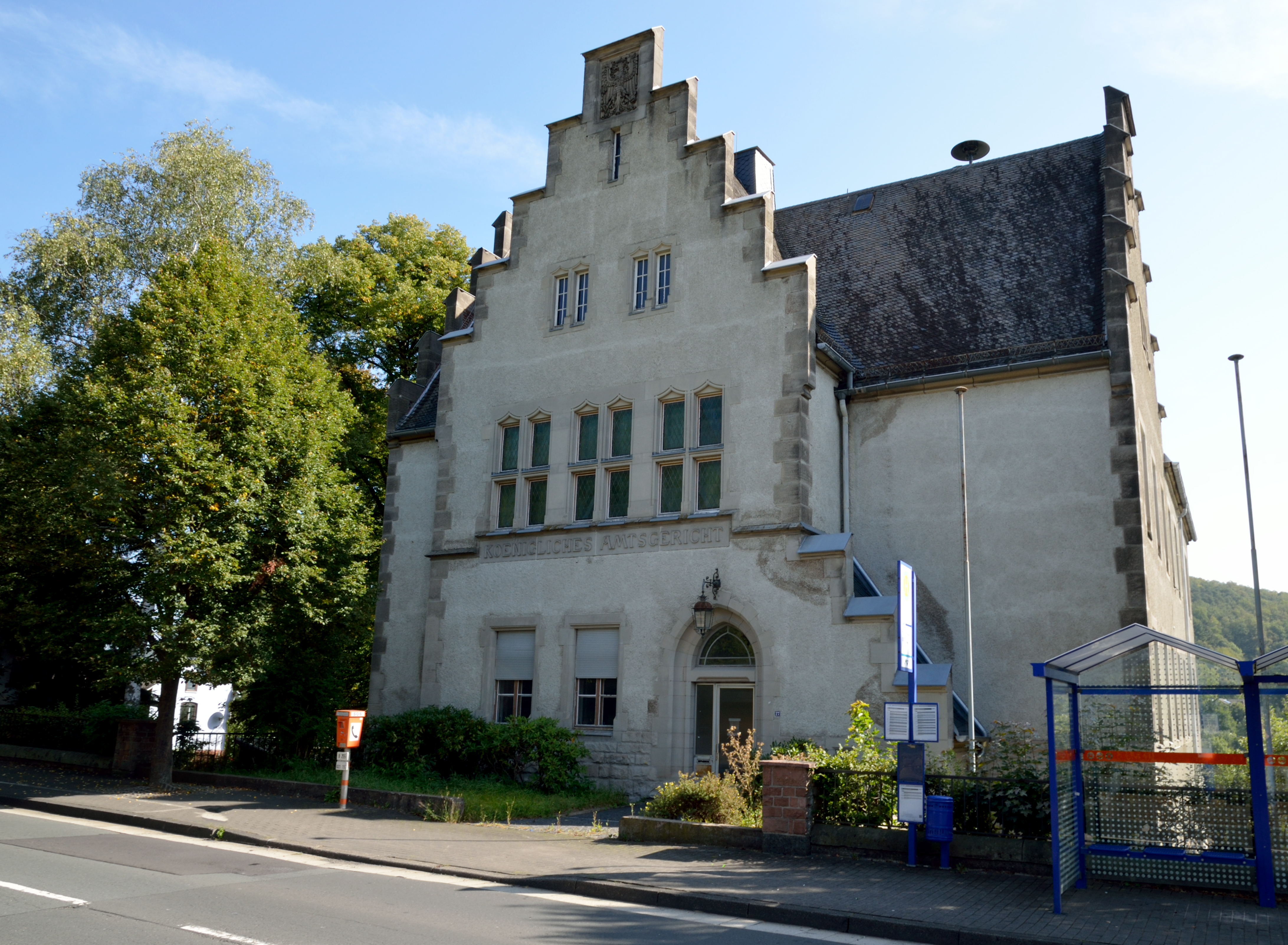 Das ehemalige Königliche Amtsgericht in Gladenbach